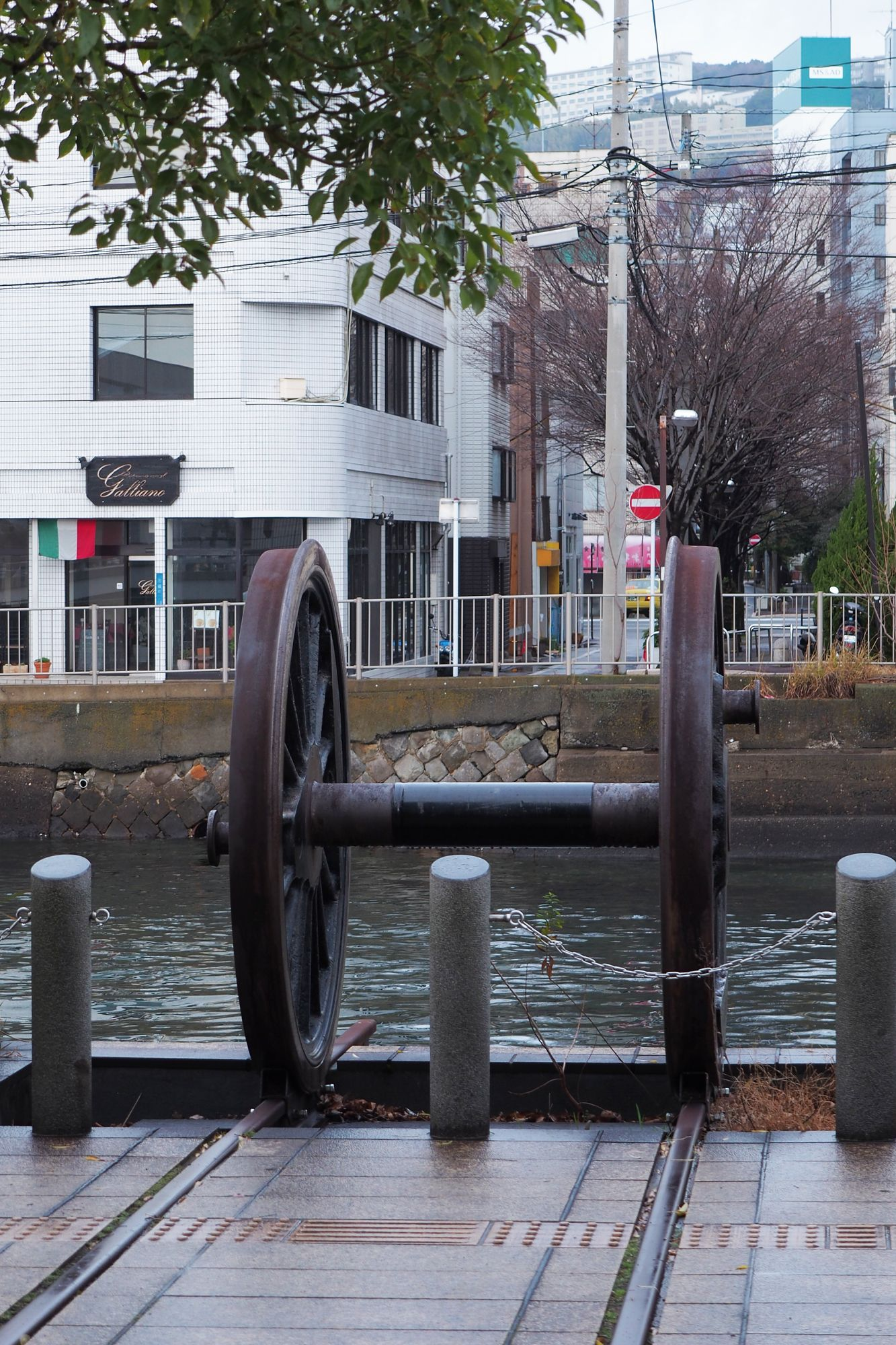 長崎本線の廃止区間、長崎-長崎港間跡に設置されている動輪のモニュメント。